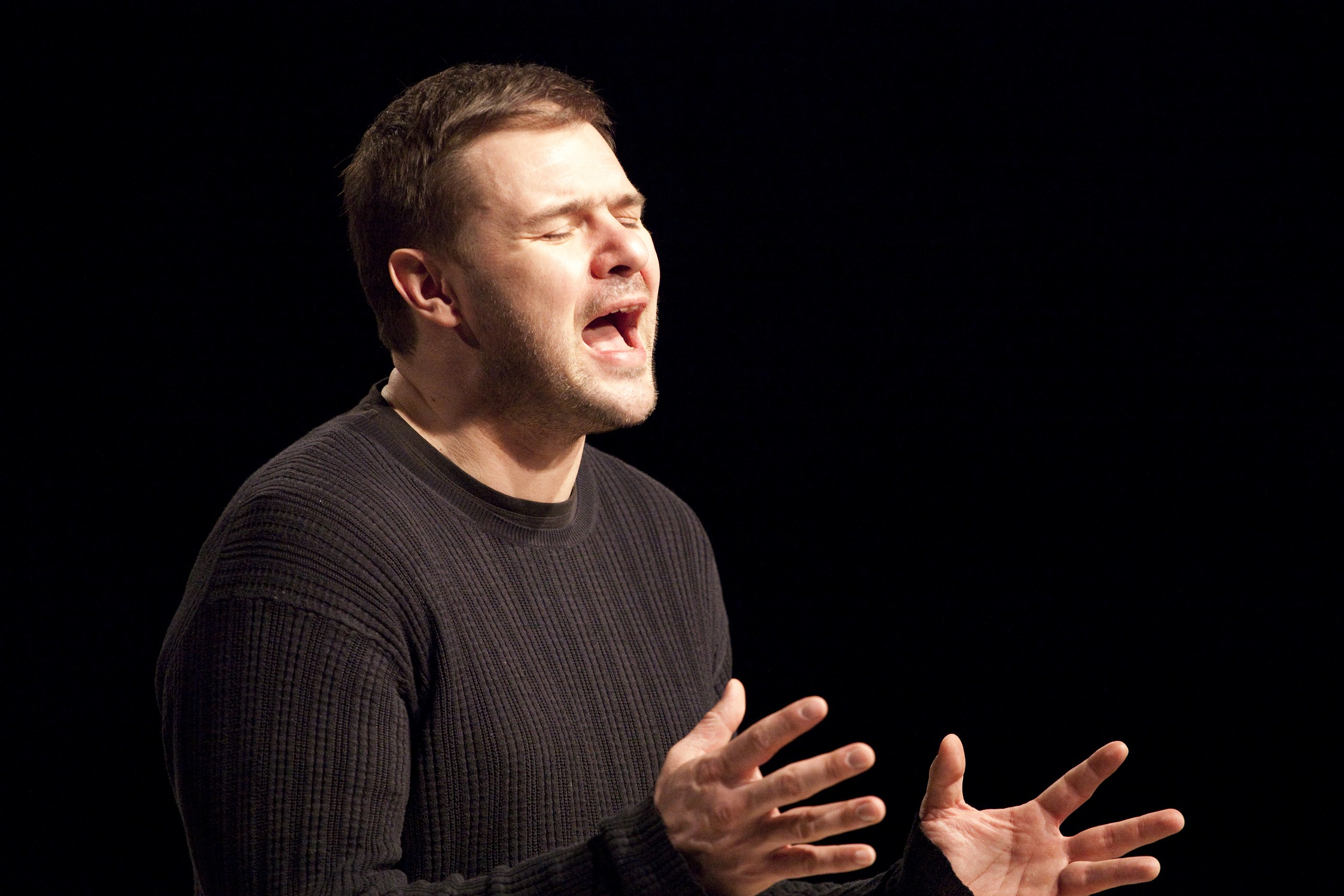 Tomasz Karolak fot. Mateusz Nasternak